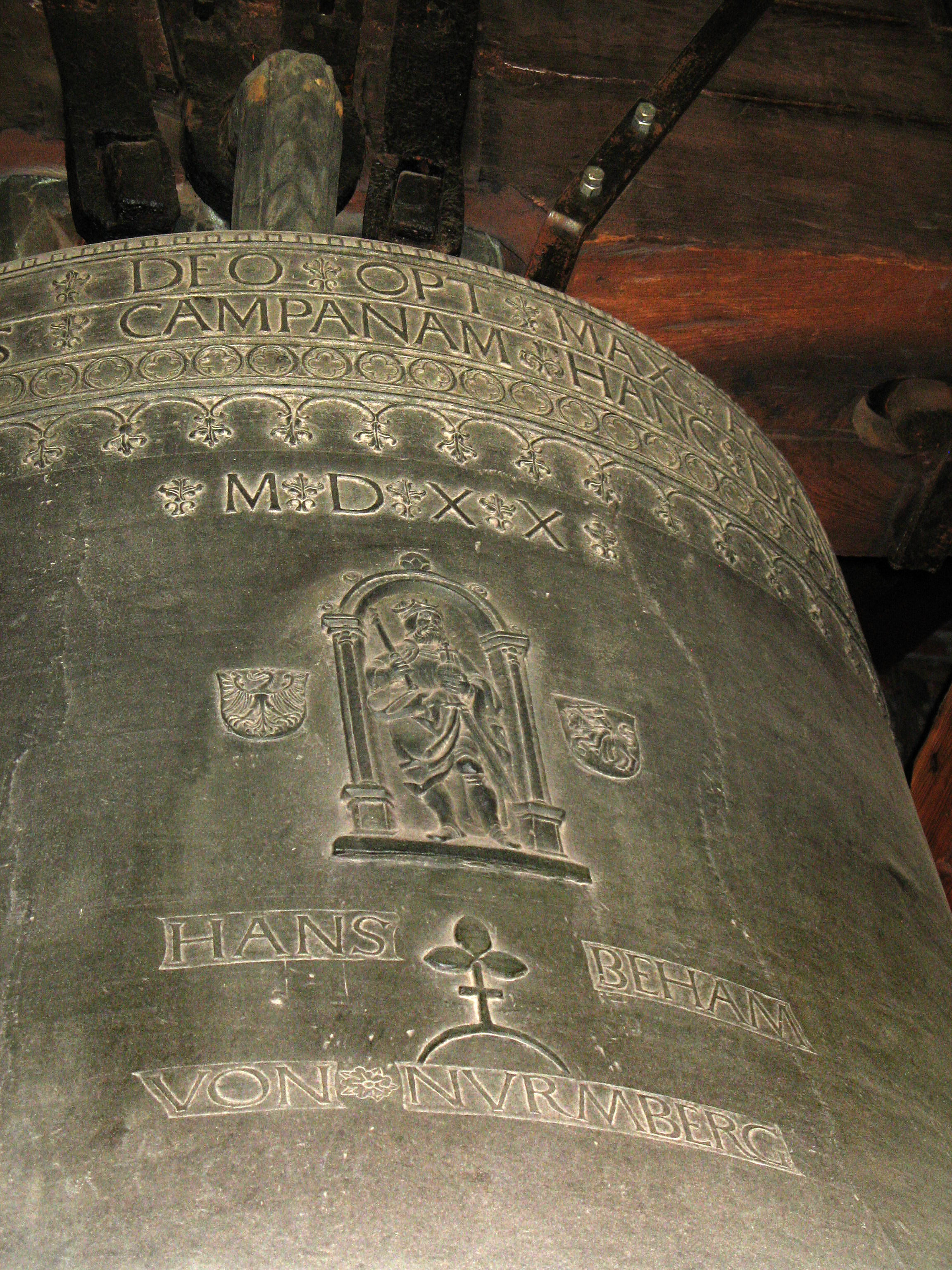 Wawel in Kraków, Poland